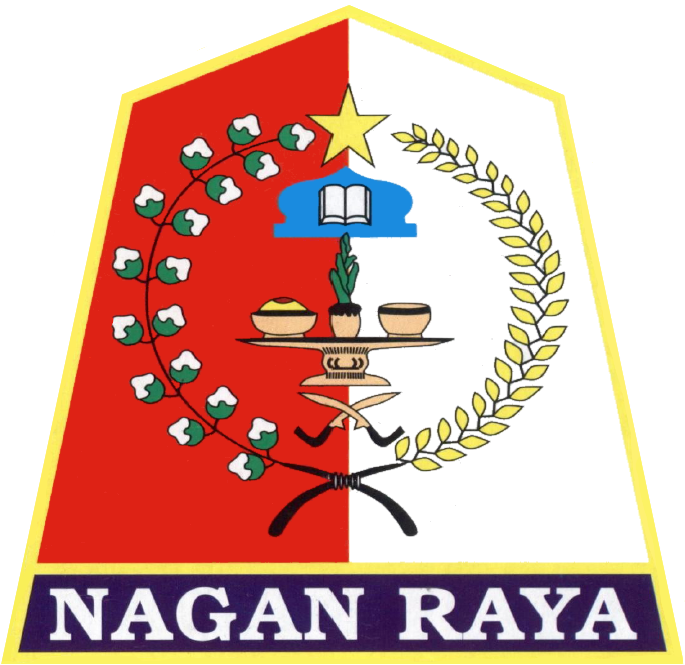 diambil dari situs resmi Pemerintah Aceh dengan teknik screenshot